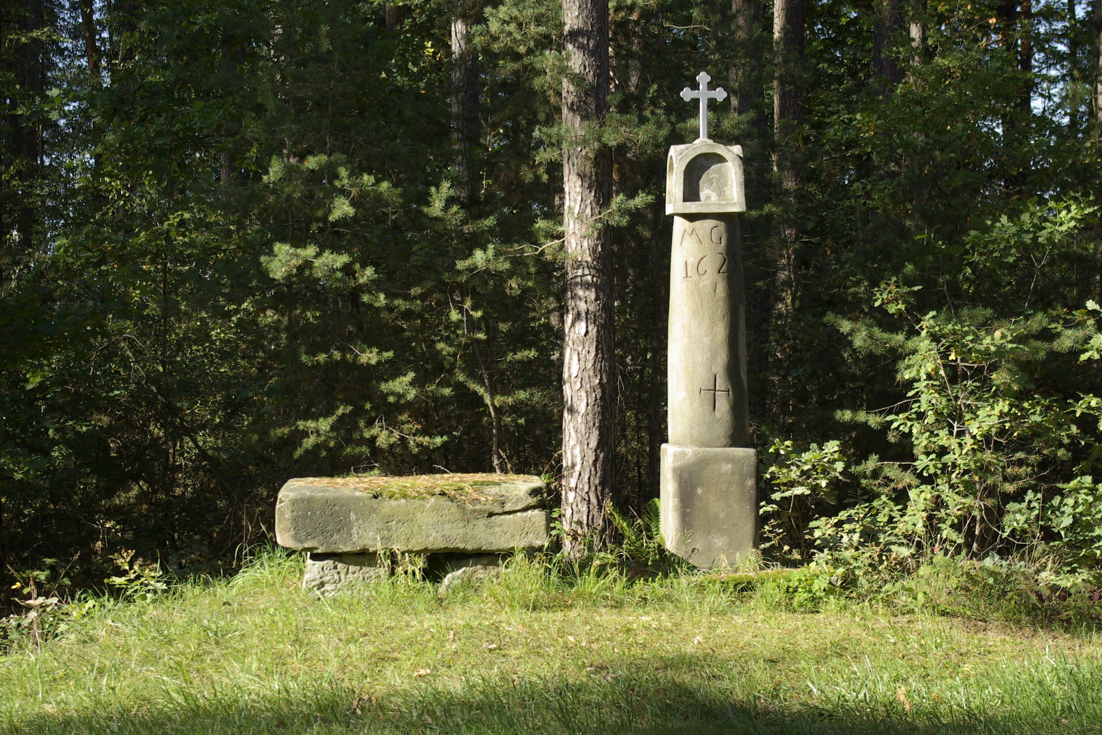 Marter und Ruhstein an der Kreisstraße FO 26 zwischen Langensendelbach und Bräuningshof.